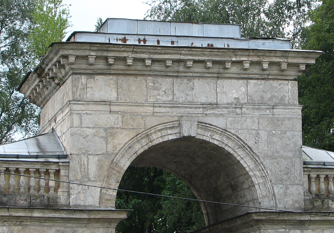 Верхний ярус Берёзовых ворот в Дворцовом парке (Гатчина)